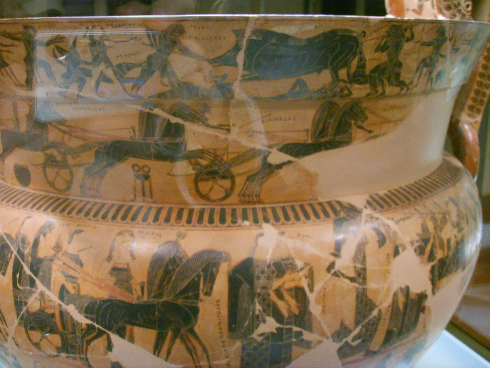 Athenian volute-krater.